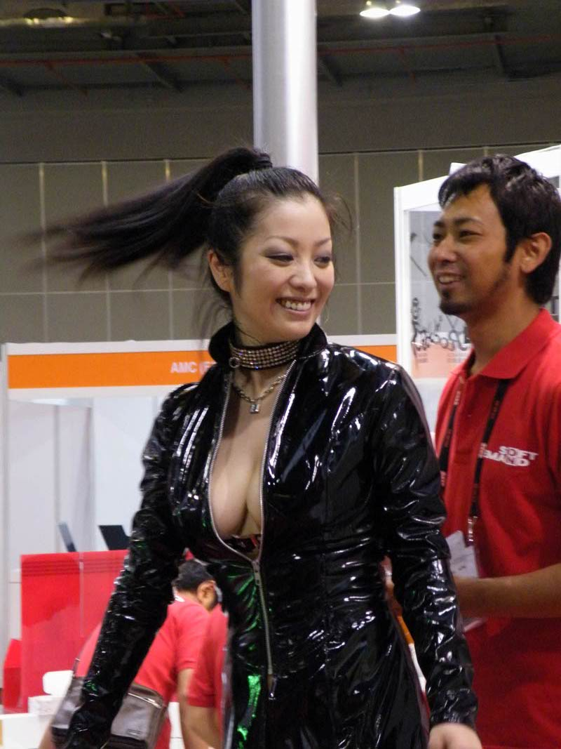 Komukai Minako (小向美奈子) at ASIA ADULT EXPO 2010